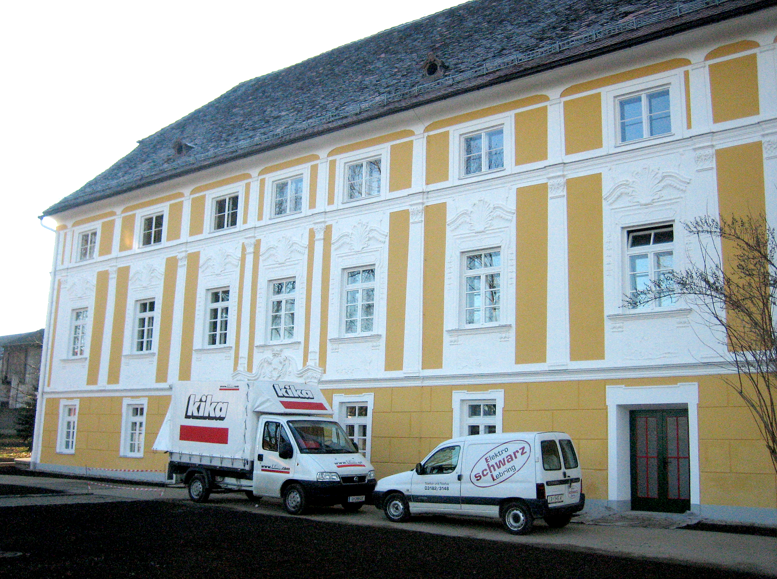 Schlossanlage Murstetten